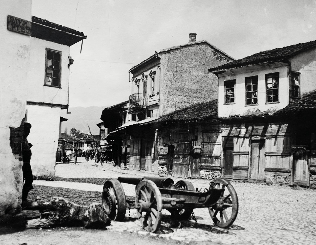 Струга во 1915 година. На сликата се гледа оставено оружје од српската војска